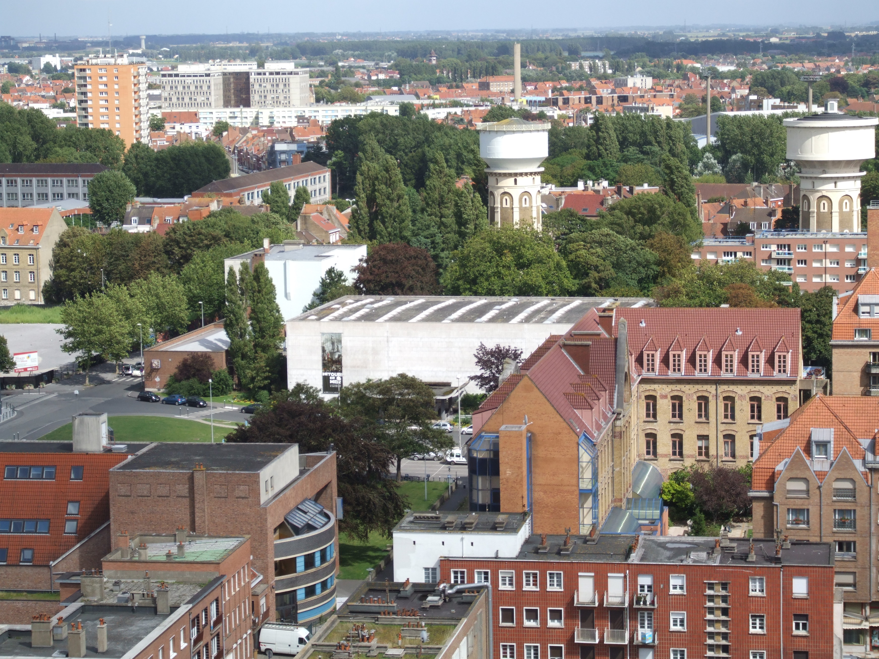 Panoramblick vom Beffroi de Dunkerque - Blick auf das Museum der schönen Künste und die beiden Wassertürme